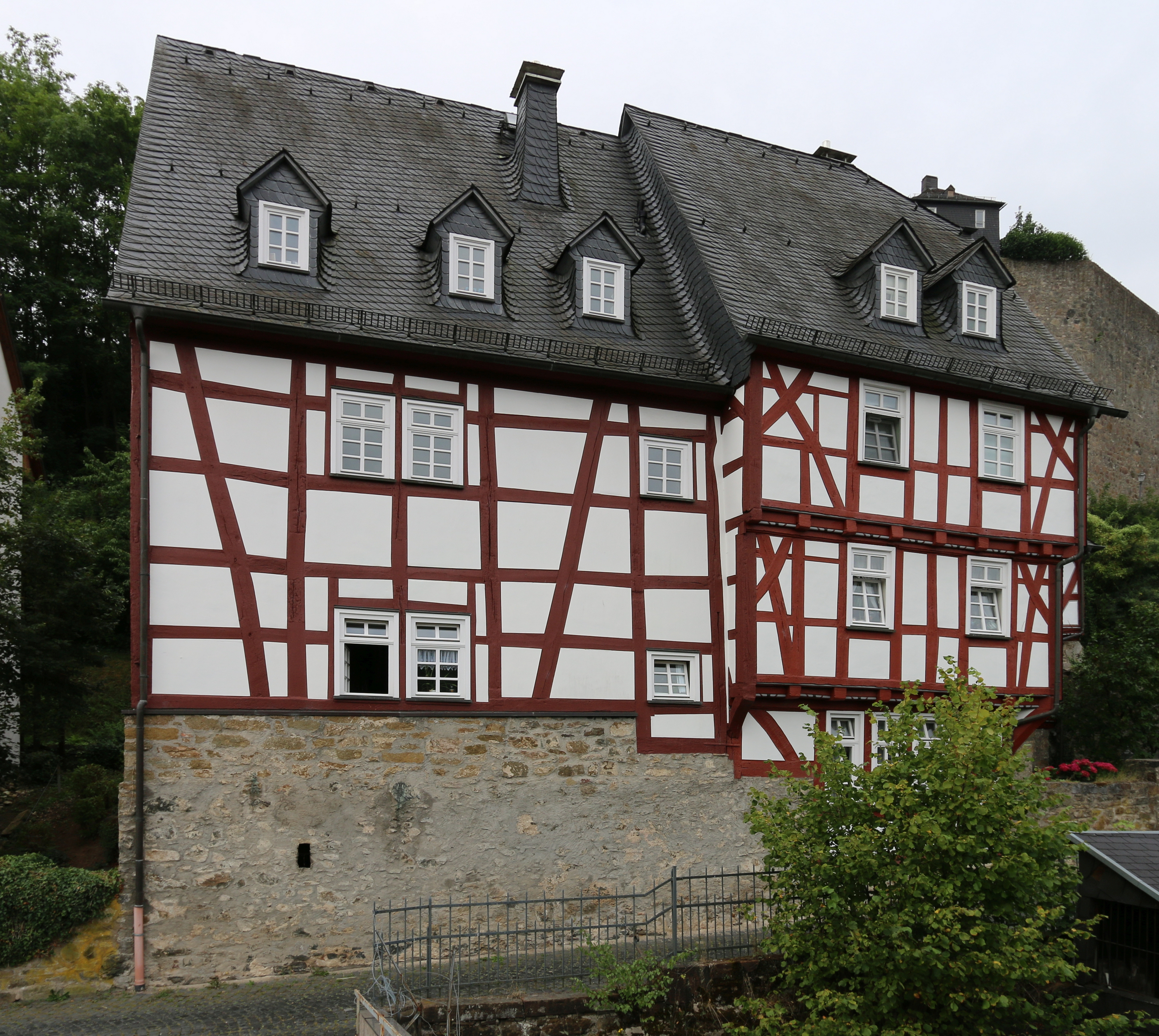 Dillenburg, Hessen: Amtshaus Kirchberg 24